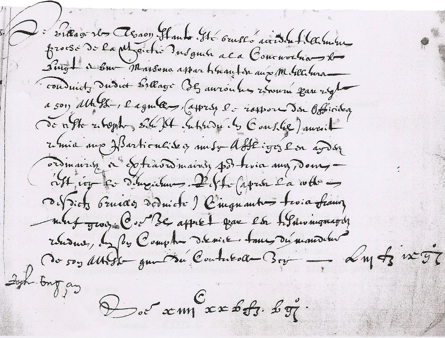 Extrait des comptes de Thaon-les-Vosges, année 1600; (archives des Vosges) ADV 7B 248